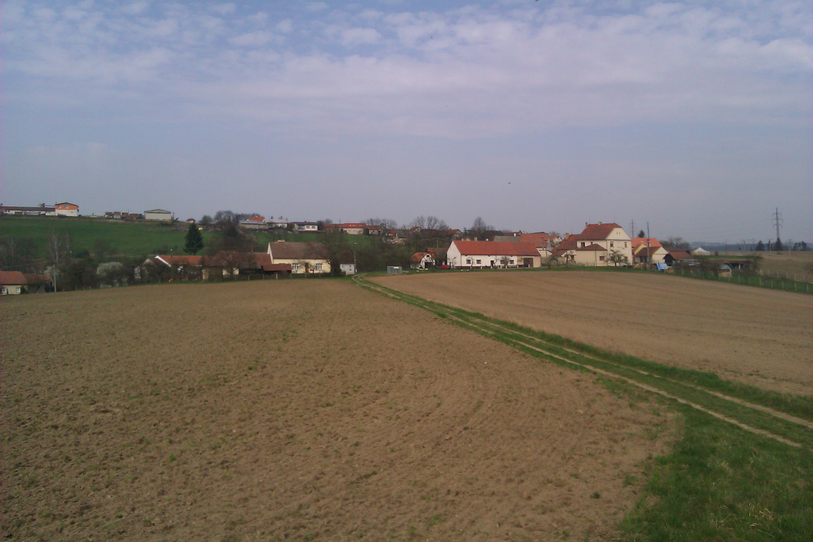 Olešná, městská část Blanska